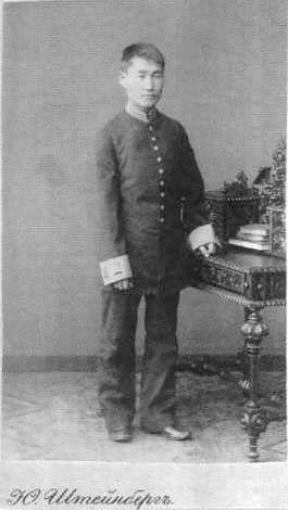 Н.Ф. Катанов (1862 - 1922) - студент Восточного факультета